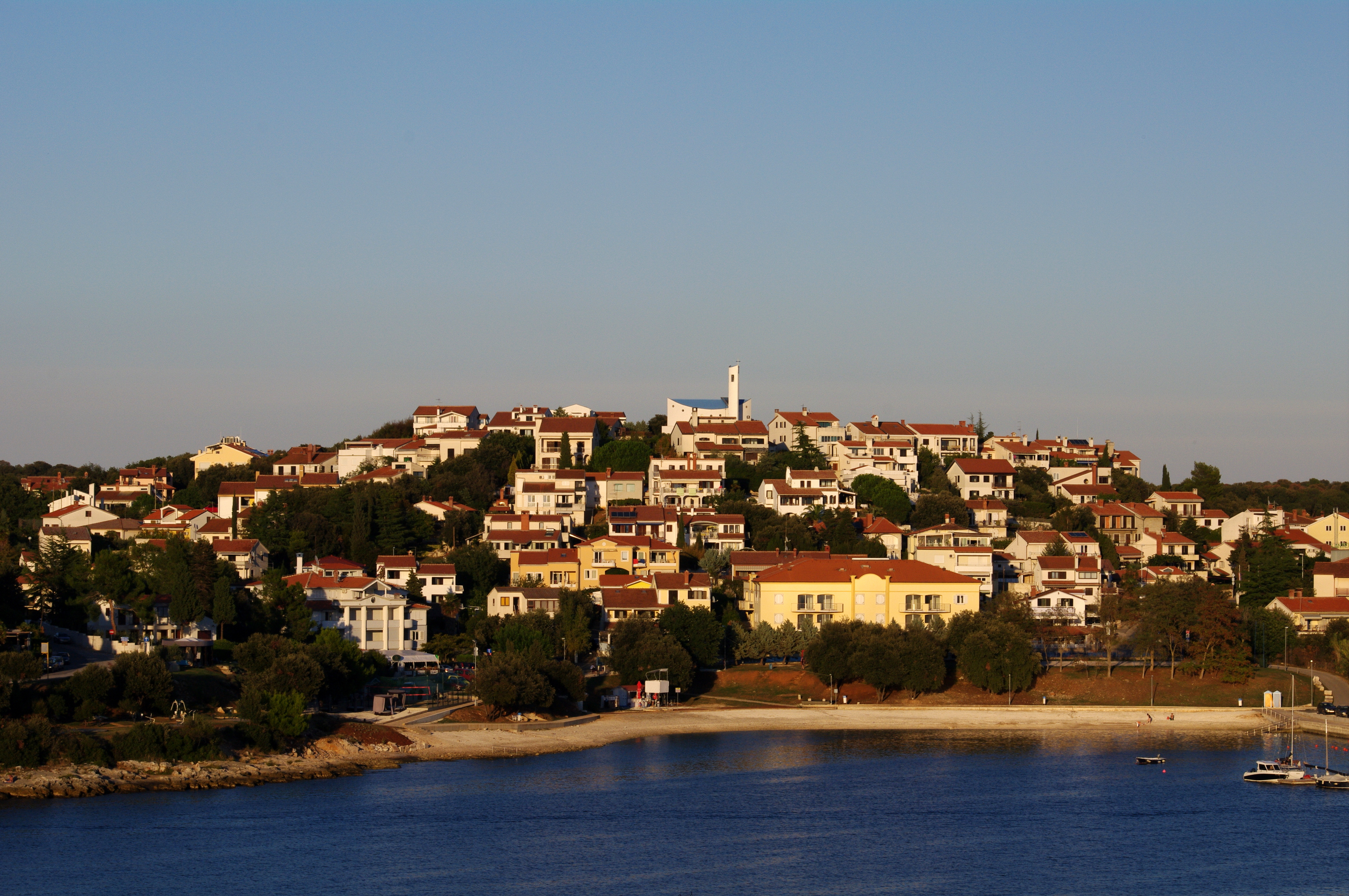 pjescana uvala